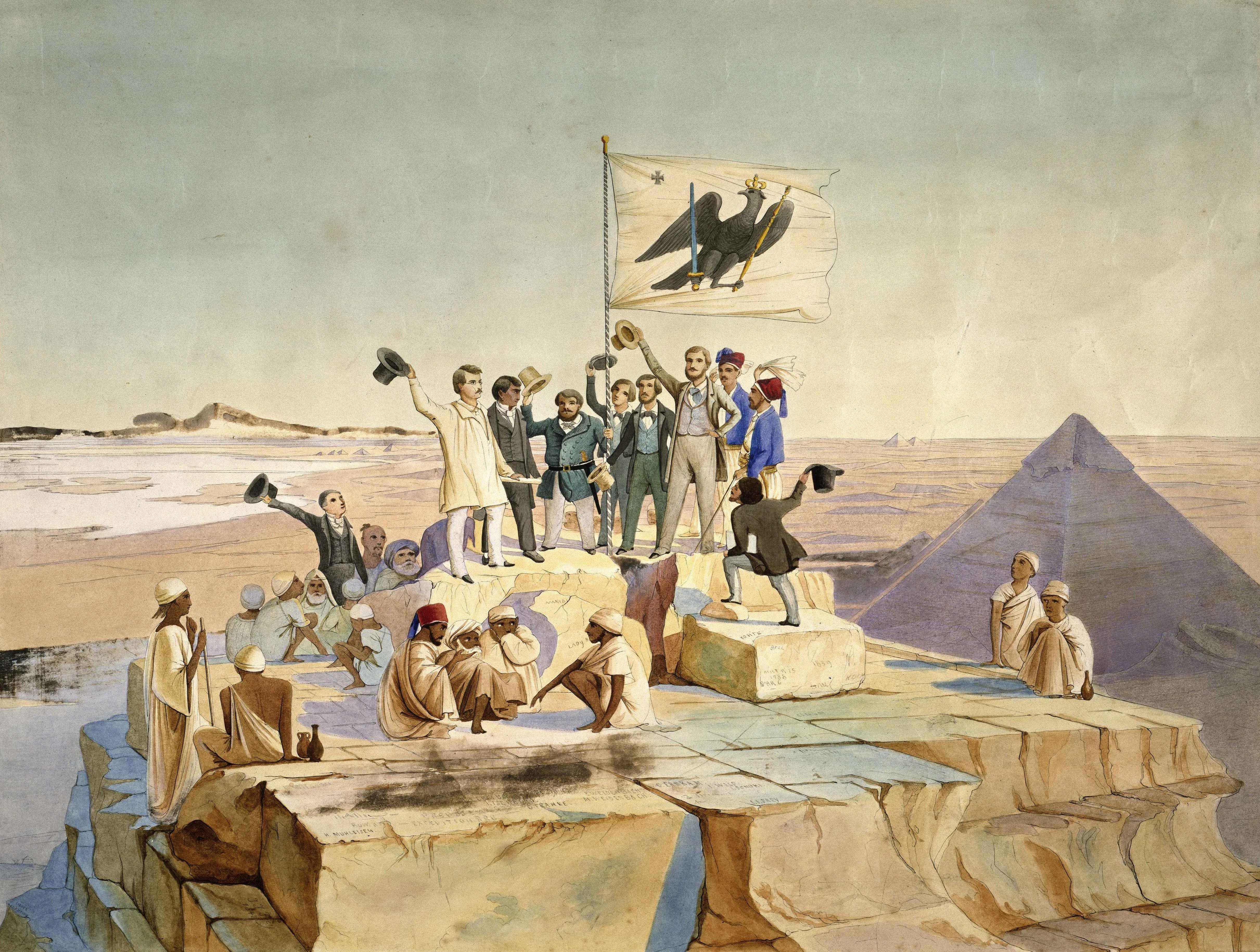 Die preußische Expedition nach Ägypten unter Richard Lepsius feiert den Geburtstag König Friedrich Wilhelm IV. auf dem Gipfel der Cheops-Pyramide am 15. Oktober 1842. Teilnehmer von links nach rechts: H. Mühleisen, Missionar; Karl Richard Lepsius; Karl Wilhelm Isenberg, Missionar der Basler Mission; Carl Franke, Gipsformer; Max Weidenbach; Ernst Weidenbach; Georg Gustav Erbkam; James William Wild; Joseph Bonomi; Johann Jacob Frey. Die beiden Missionare Mühleisen und Isenberg begleiteten die Expeditionsmitglieder nur auf diesem Ausflug. Heinrich Abeken und Otto Georgi stießen erst später zur Expedition hinzu.